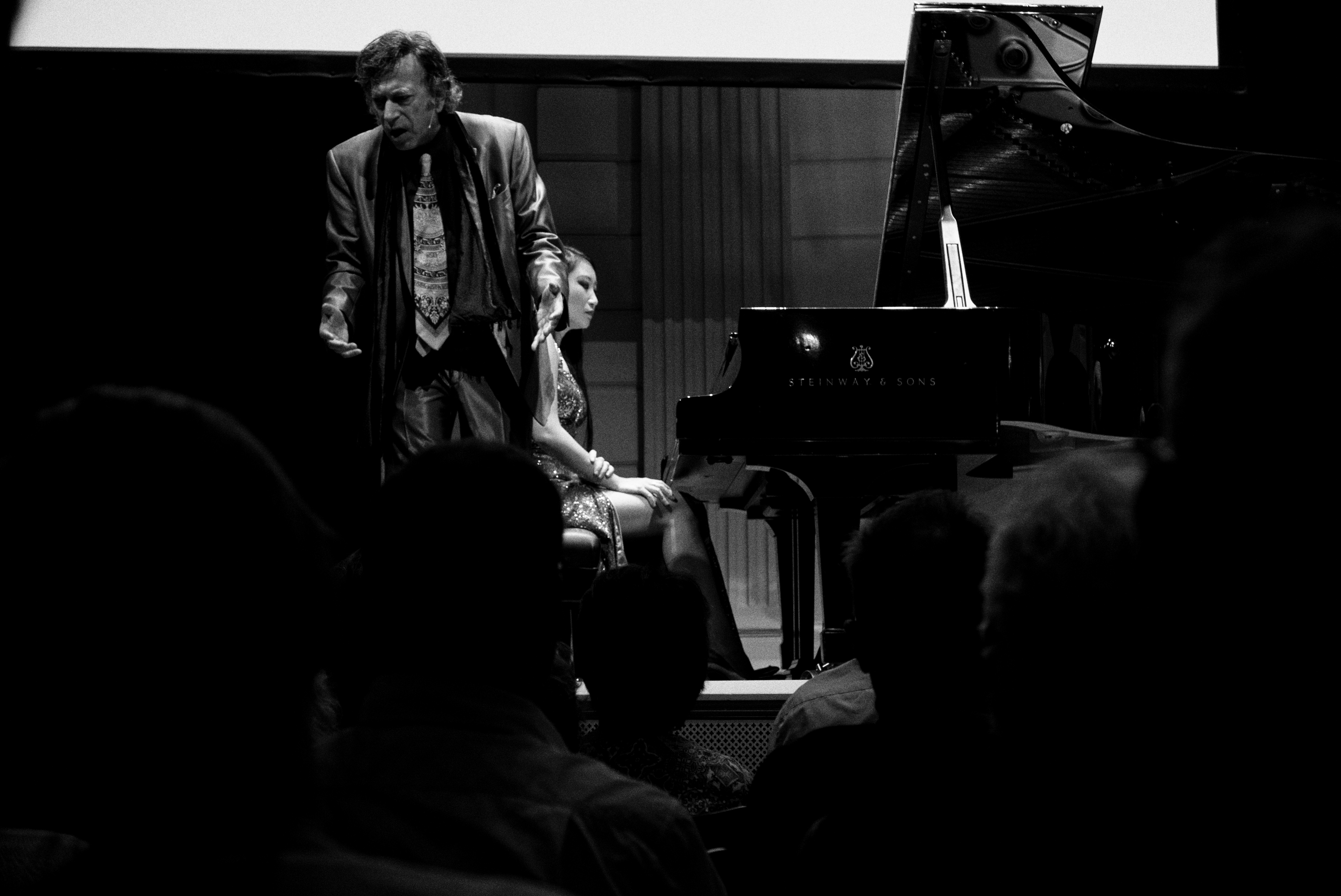 David Dubal piano-expert, docent Juilliard Rexa Han pianist